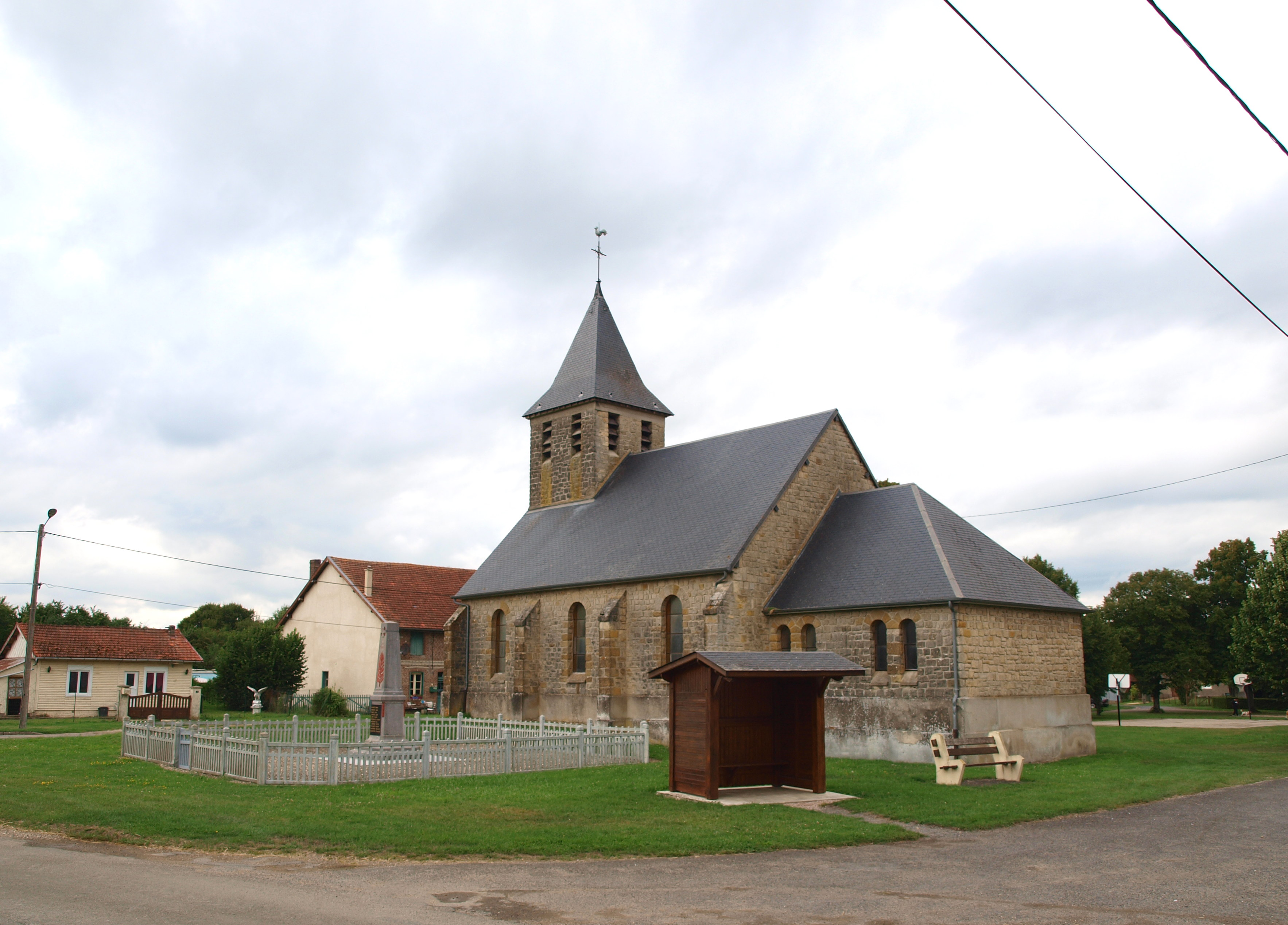 Chevières (Ardennes, France) ; église & monument aux morts.